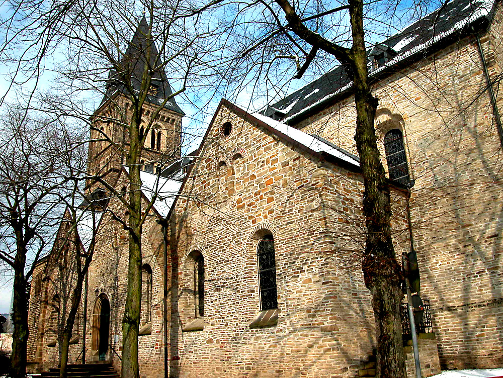 Ehemalige Stifts, heute evangelische Pfarrkirche von Herdecke